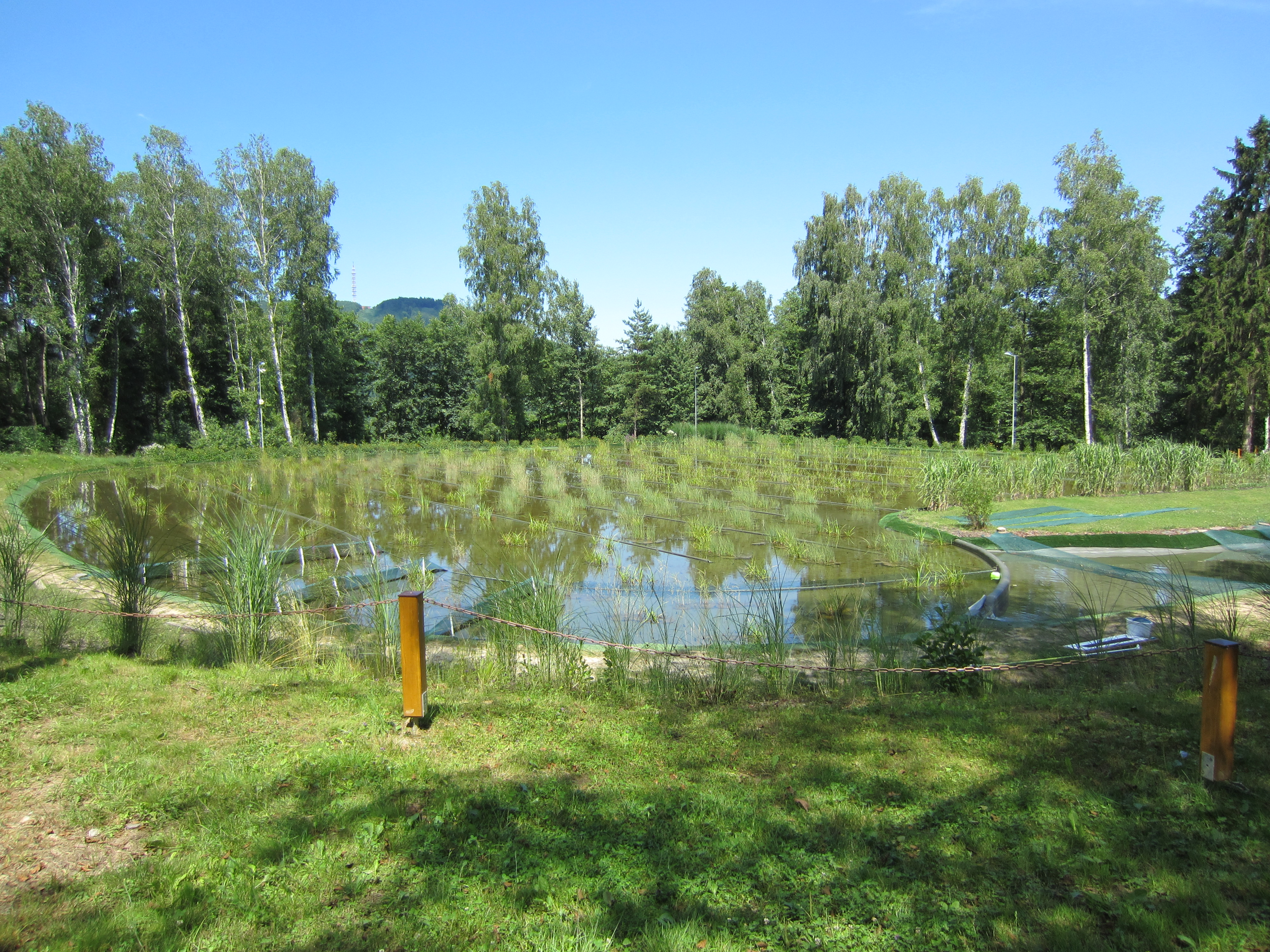 Bazén slúžiaci na filtráciu a čistenie vody v areáli Biokúpaliska Sninské rybníky